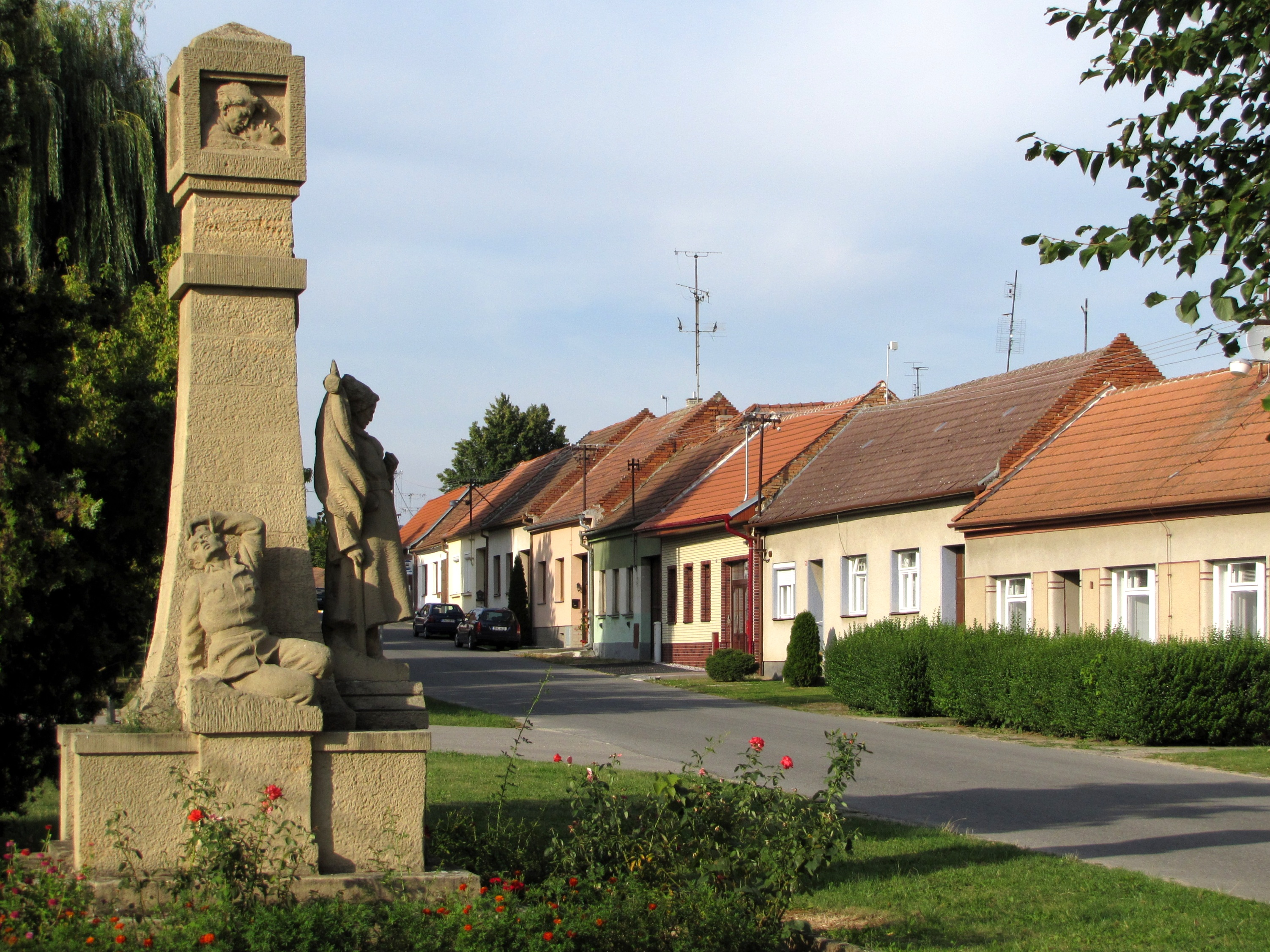 Náves v Moravanech, okres Hodonín. V popředí pomník obětem 1. a 2. světové války.